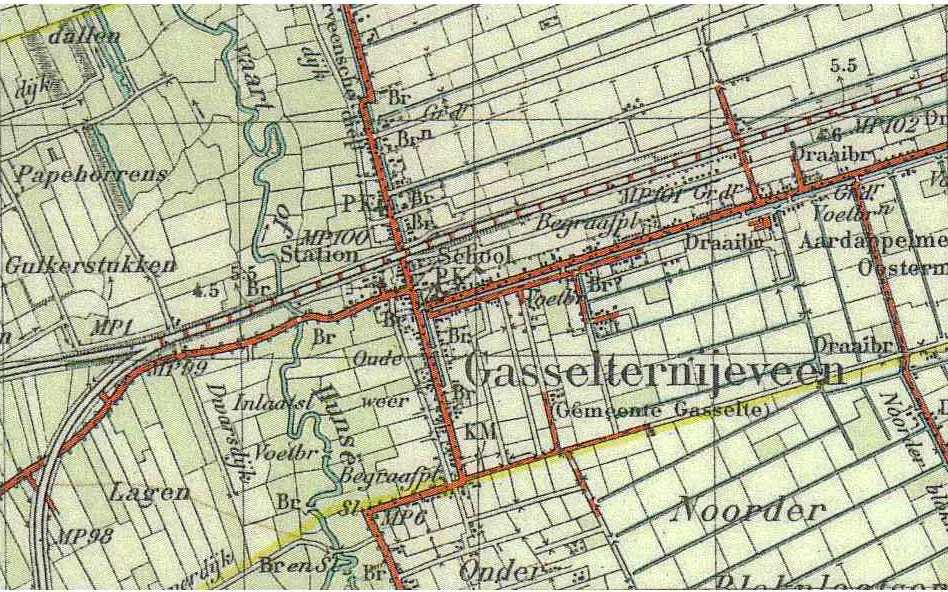 Gasselternij(e)veen op de topografische kaart in 1928. Publiek domein wegens ouderdom